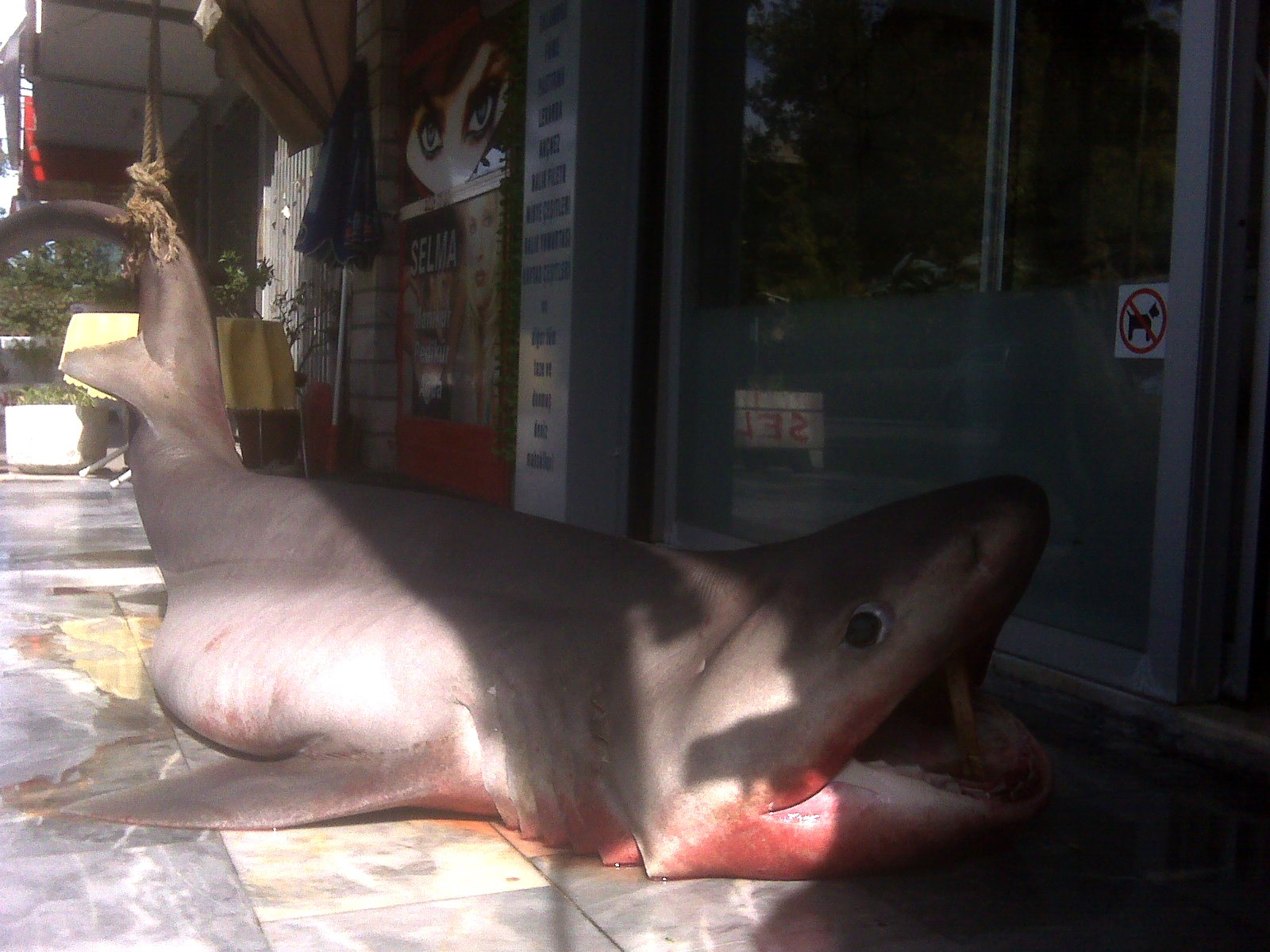 Bluntnose sixgill shark (Hexanchus griseus) in Ankara, Turkey